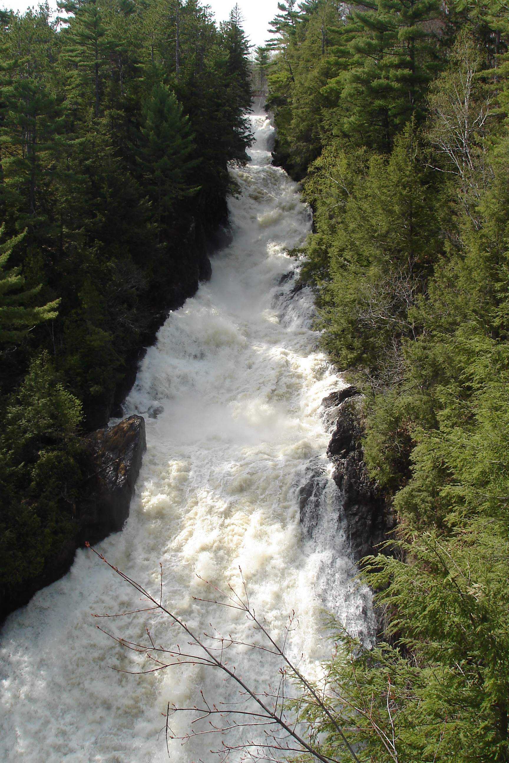 Les chutes Sainte-Ursule au printemps 2008 (10 mai 2008)